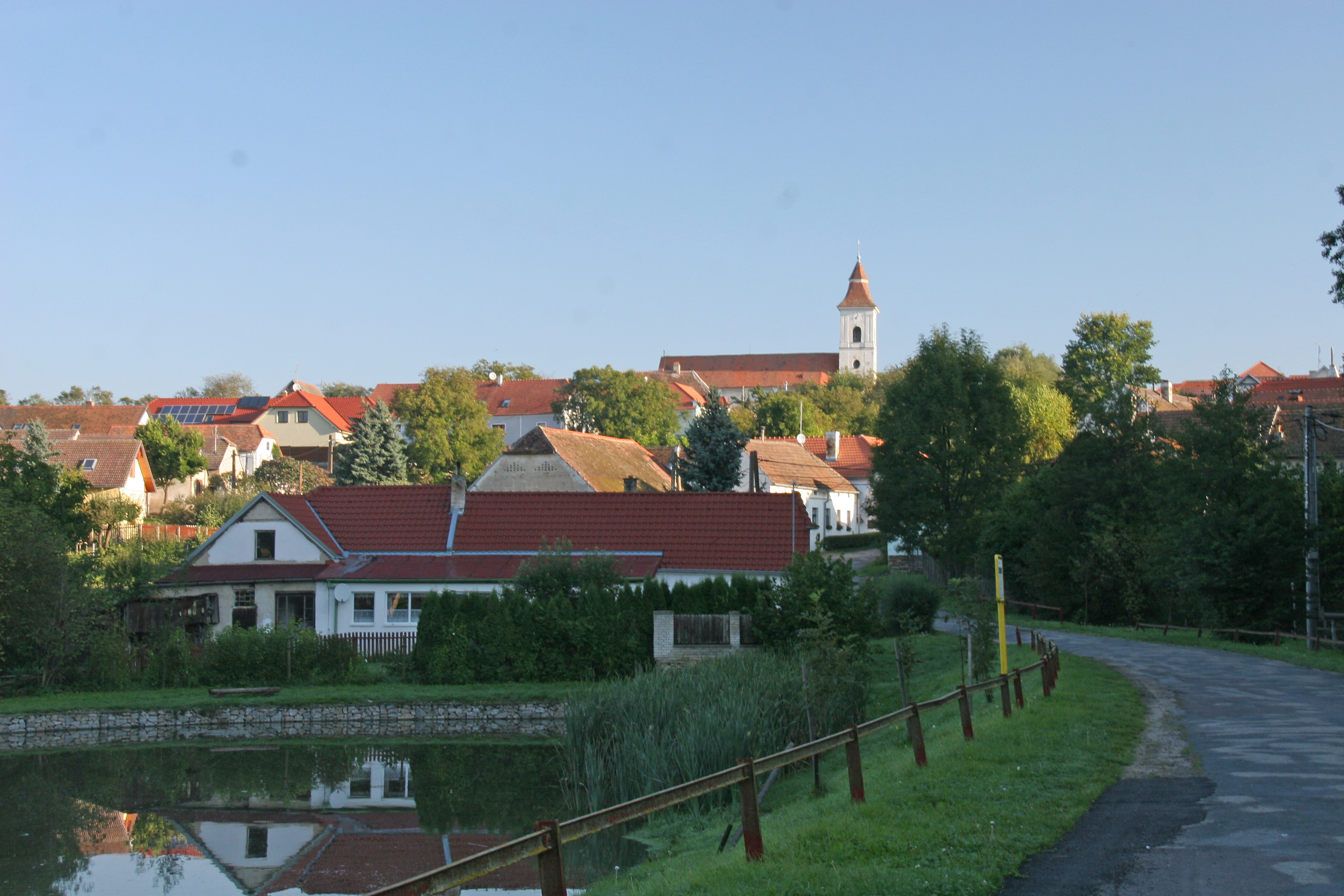 Lukov od rybníka